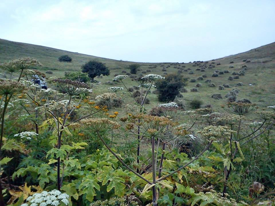 گياه دارويي بالديرغان در آرپاچوخوري روستاي خان كندي گرمي